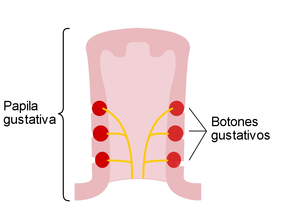 Esquema en el que puede observarse una papila gustativa en la que existen 6 botones gustativos.